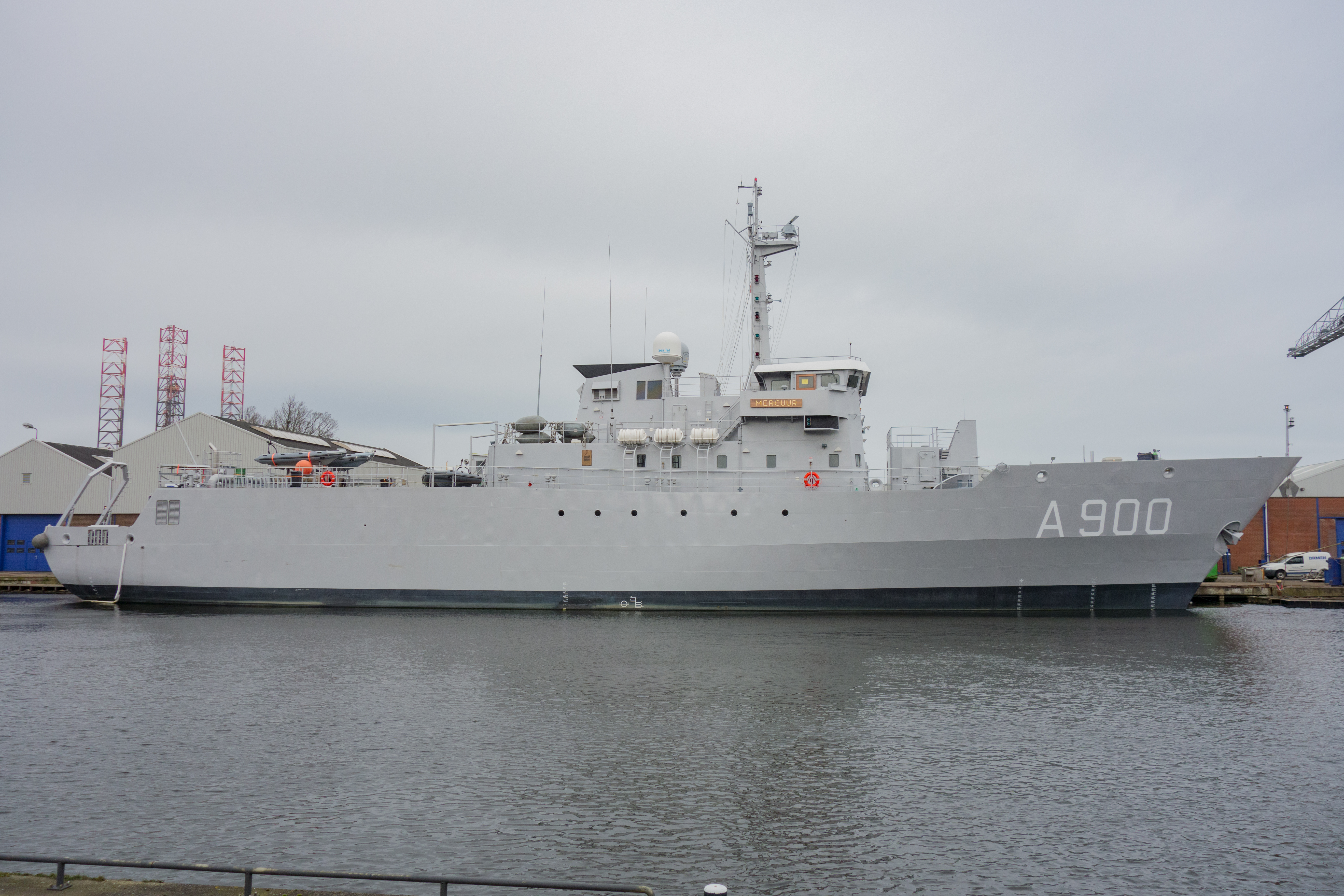 Zr. Mr. Mercuur (A900) ligt afgemeerd in de Koopvaarders Binnenhaven in Den Helder